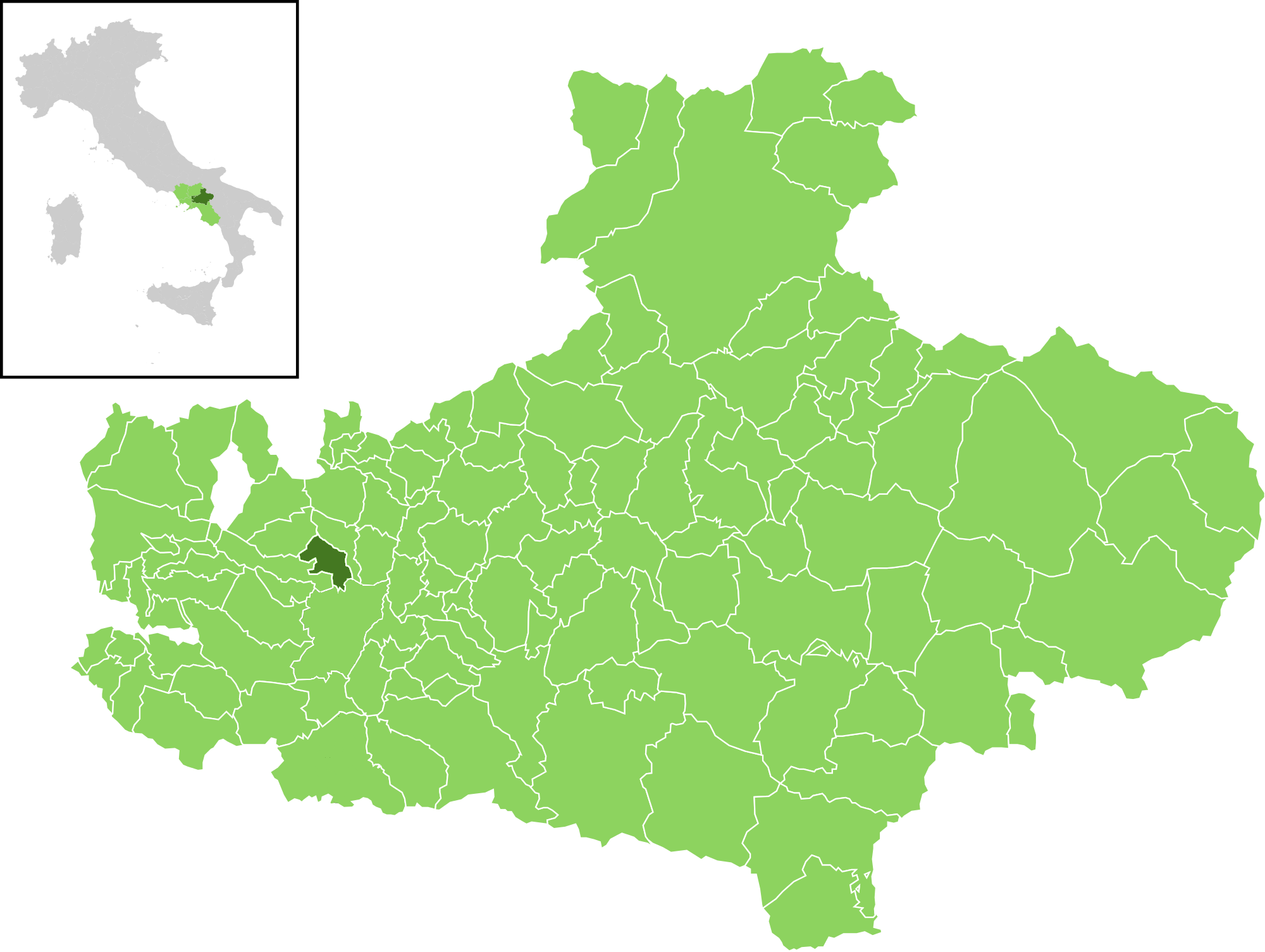 Il comune all'interno della provincia di Avellino